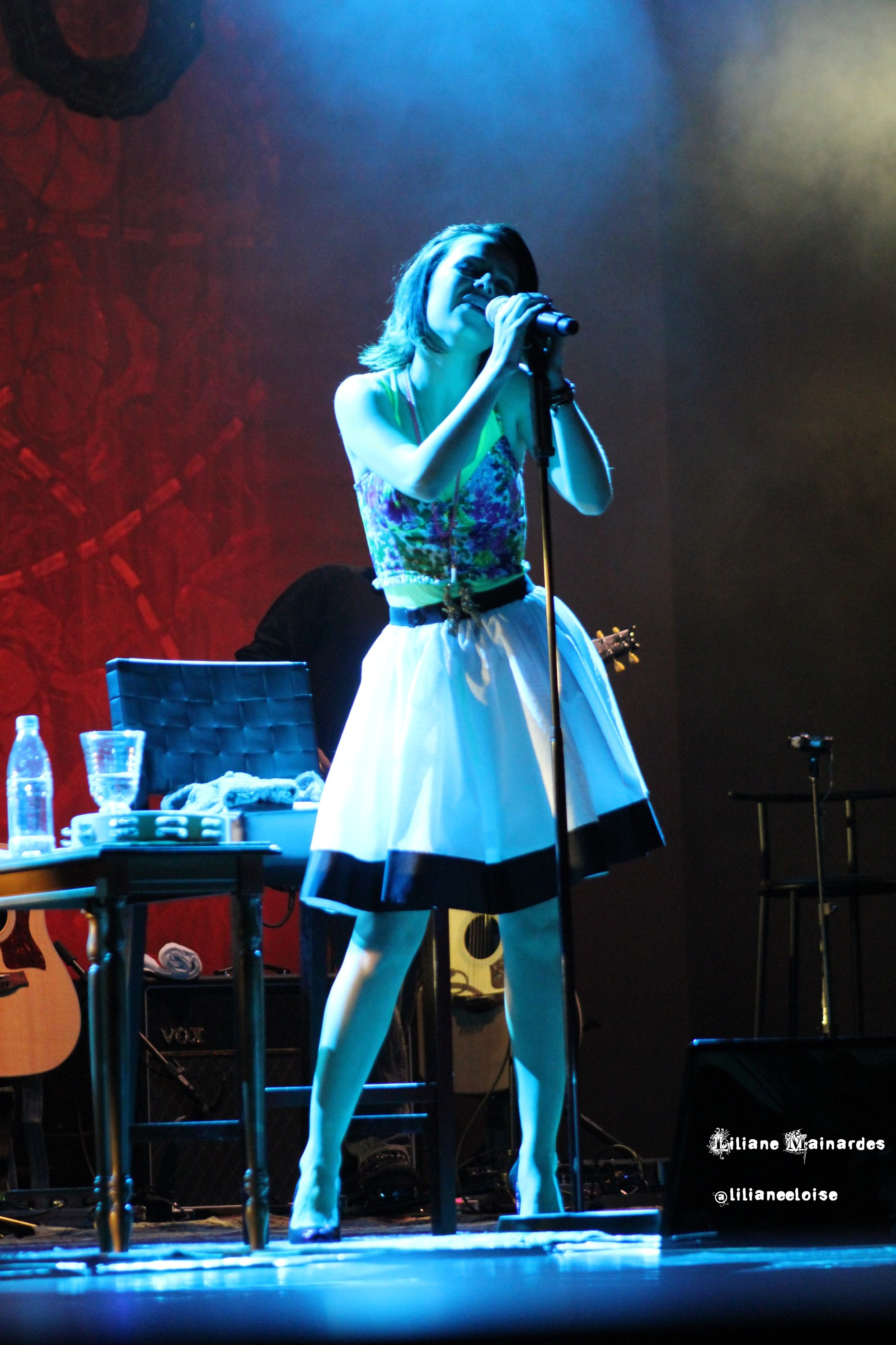 Sandy durante um show da Turnê Manuscrito em Curitiba.